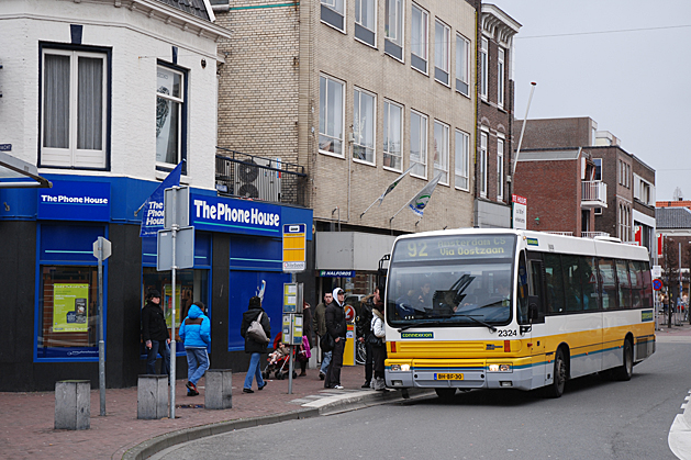 Den Odsten B95 Alliance 2324 op lijn 92 Zaandam Station - Amsterdam CS te Zaandam Gedempte Gracht.